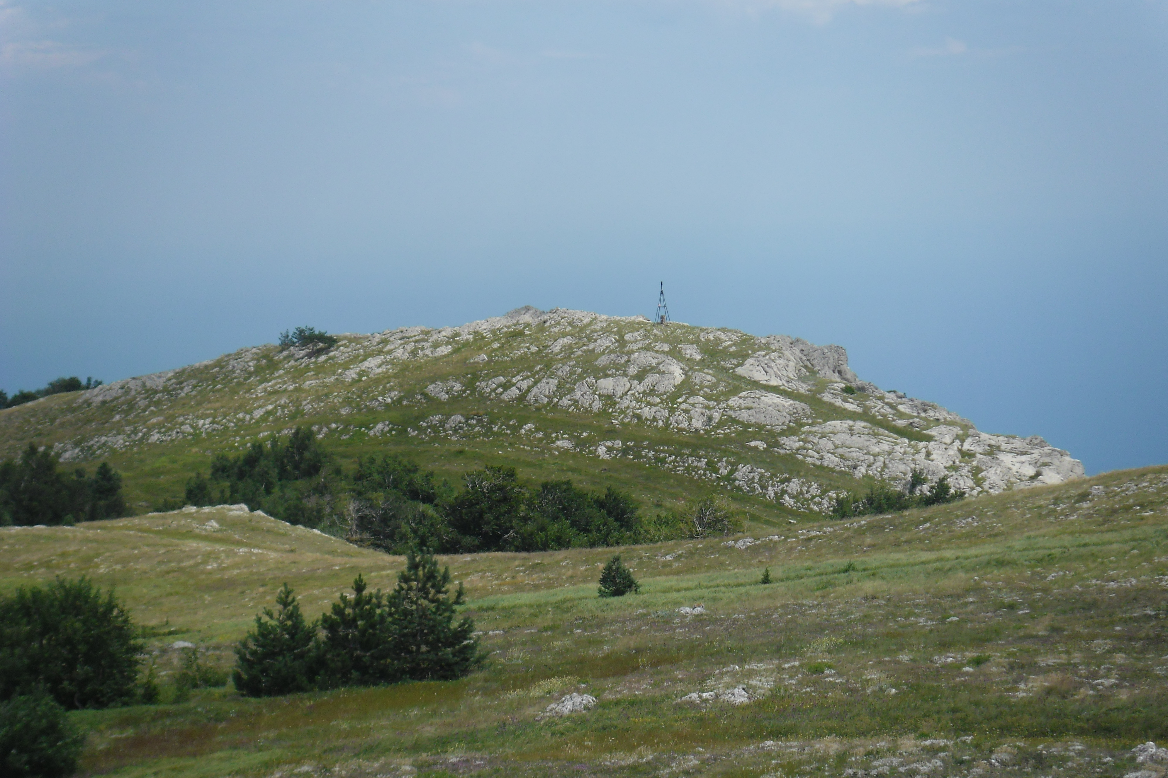 Фото